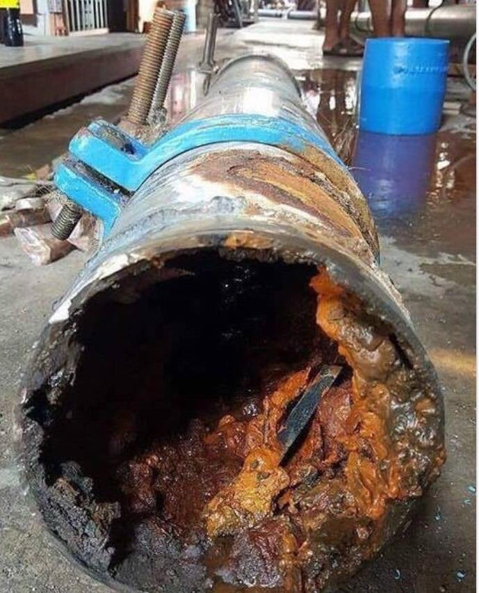 Бактерії у трубі